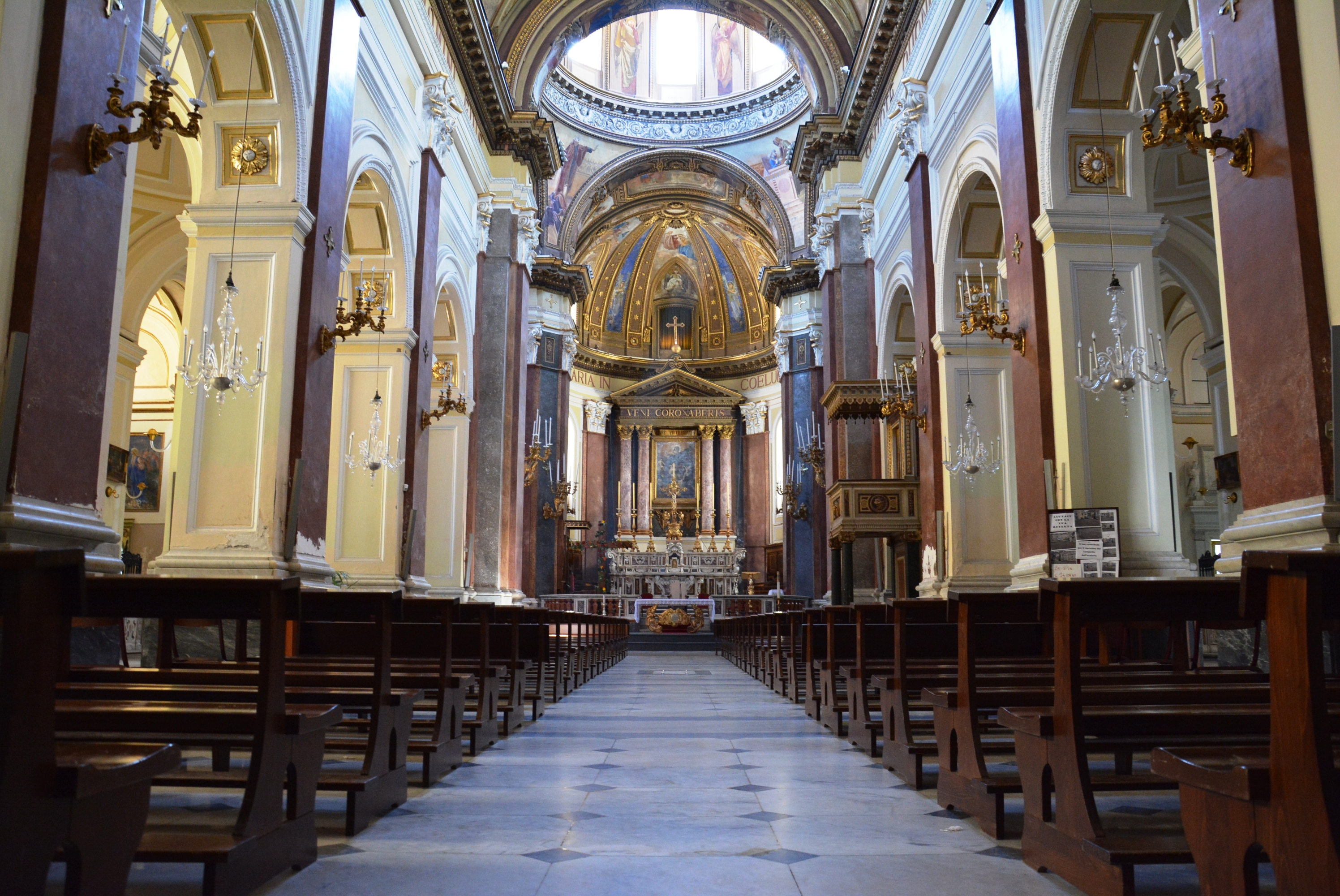 Concattedrale di Maria Santissima Assunata a Castellammare di Stabia